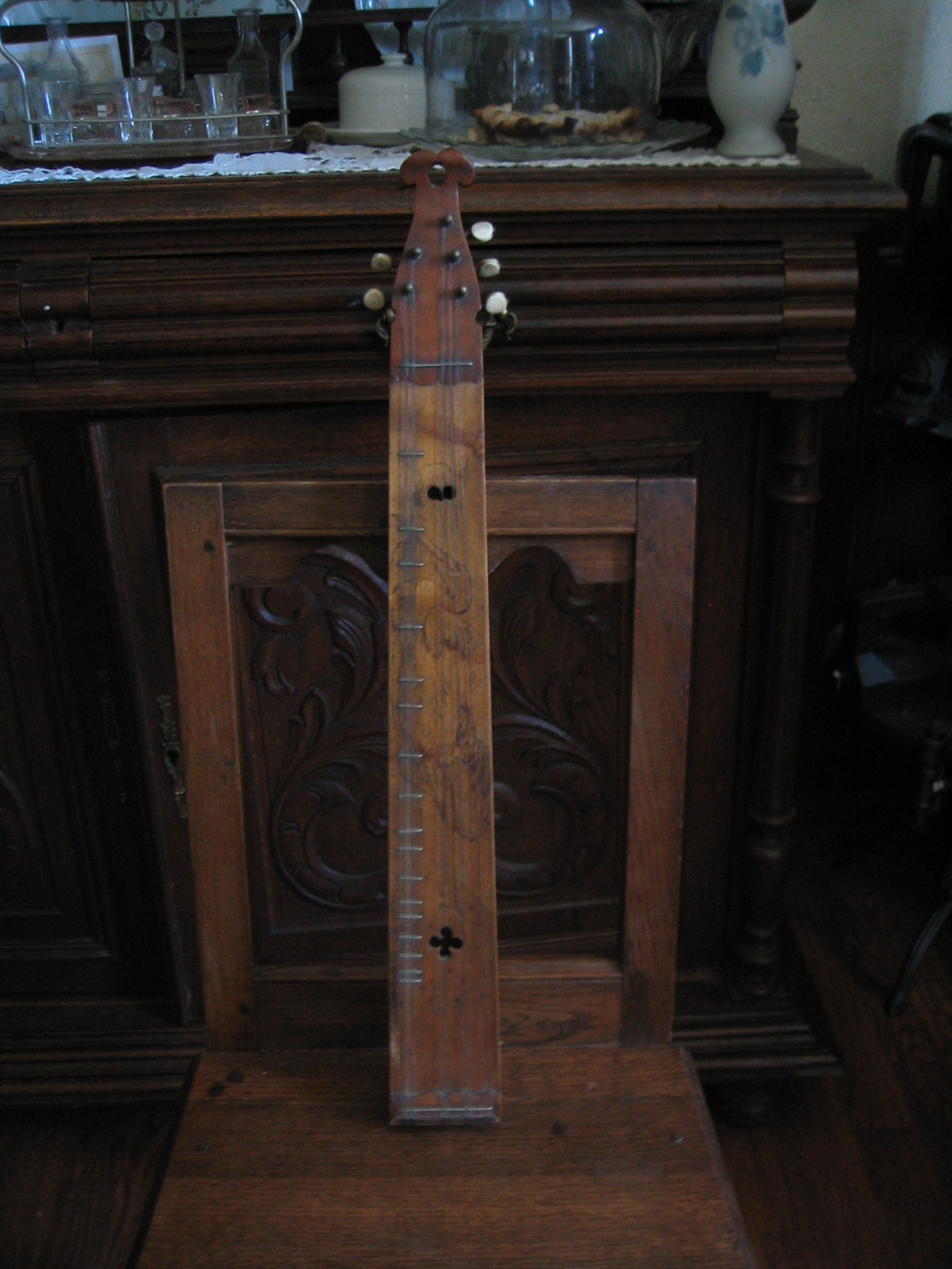 Epinette des Vosges (Ferme-musée de la Soyotte, près de Saint-Dié-des-Vosges)